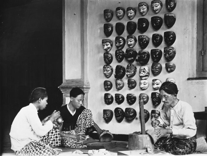 Foto. Houtsnijders vervaardigen maskers, Nederlands-Indië